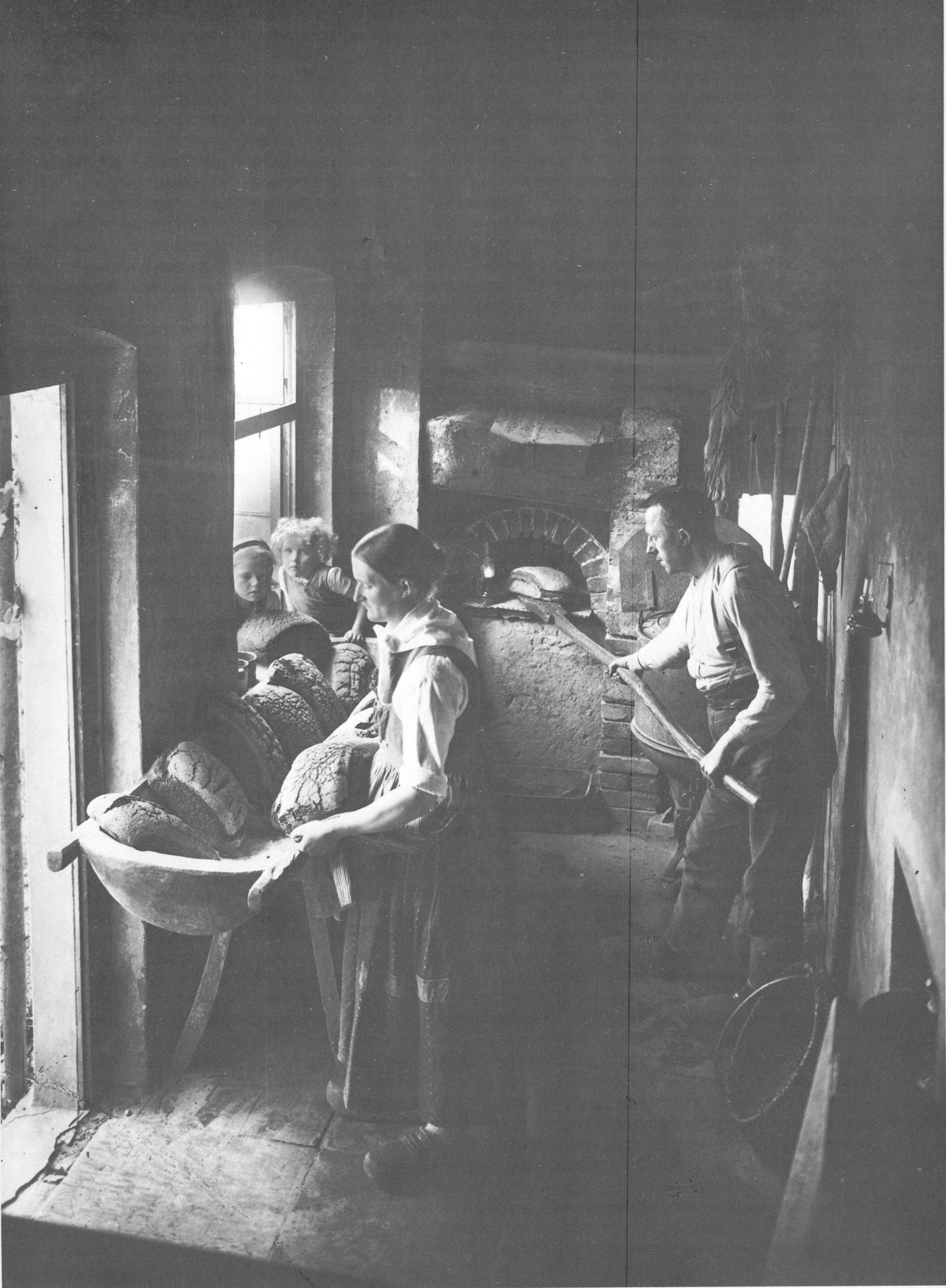 Brotbacken im Backhaus, Mennighüffen, Kreis Herford, 1904